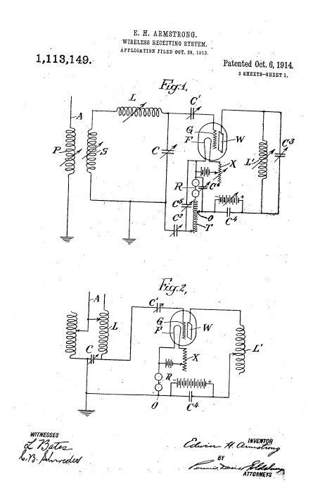 Рисунки из патента Армстронга US 1,113,149 Oct.6, 1914.